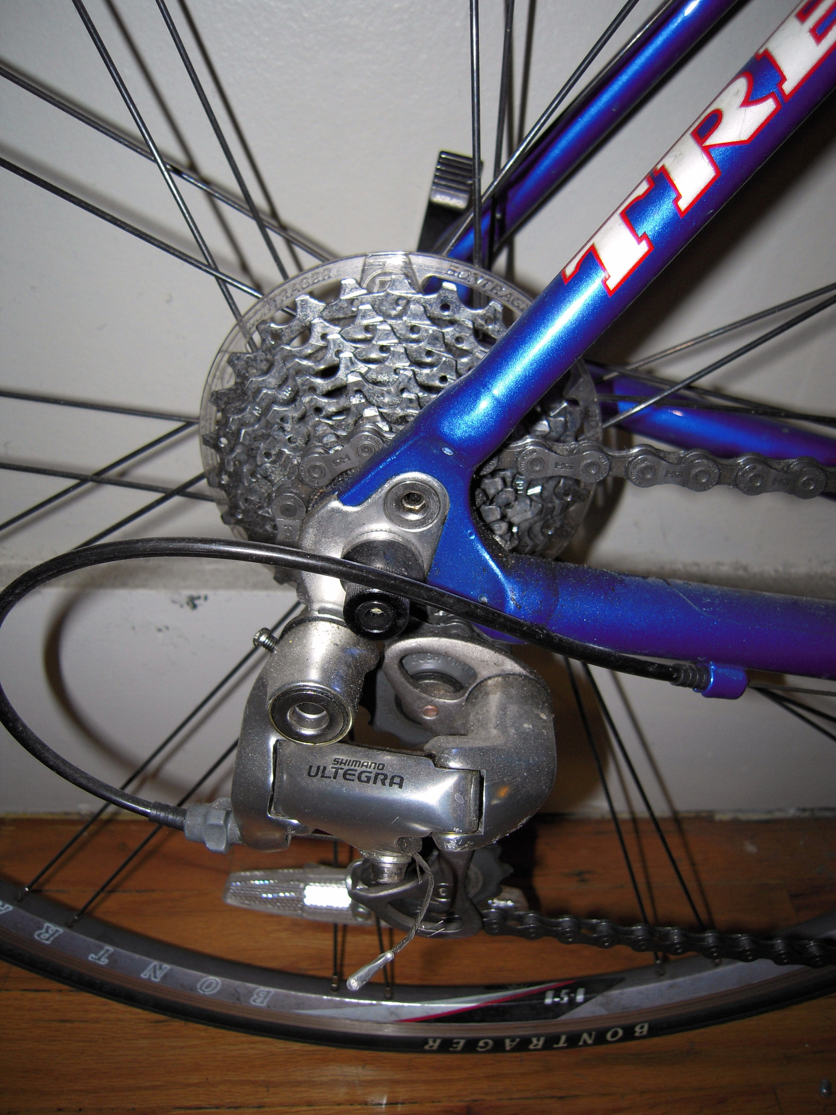 Shimano ultegra component